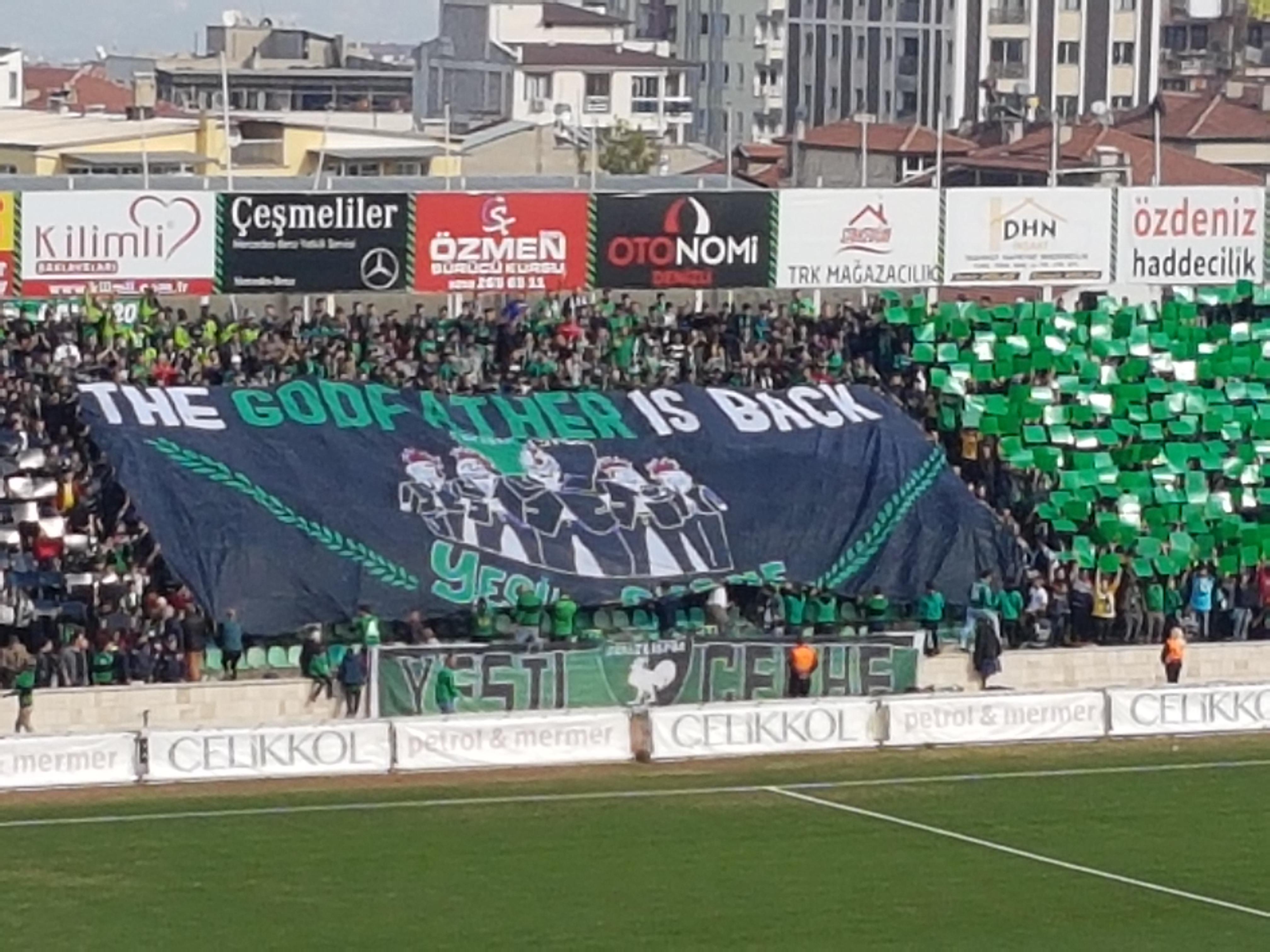 25 Kasım 2018 tarihinde oynanan Denizlispor-Giresunspor karşılaşması